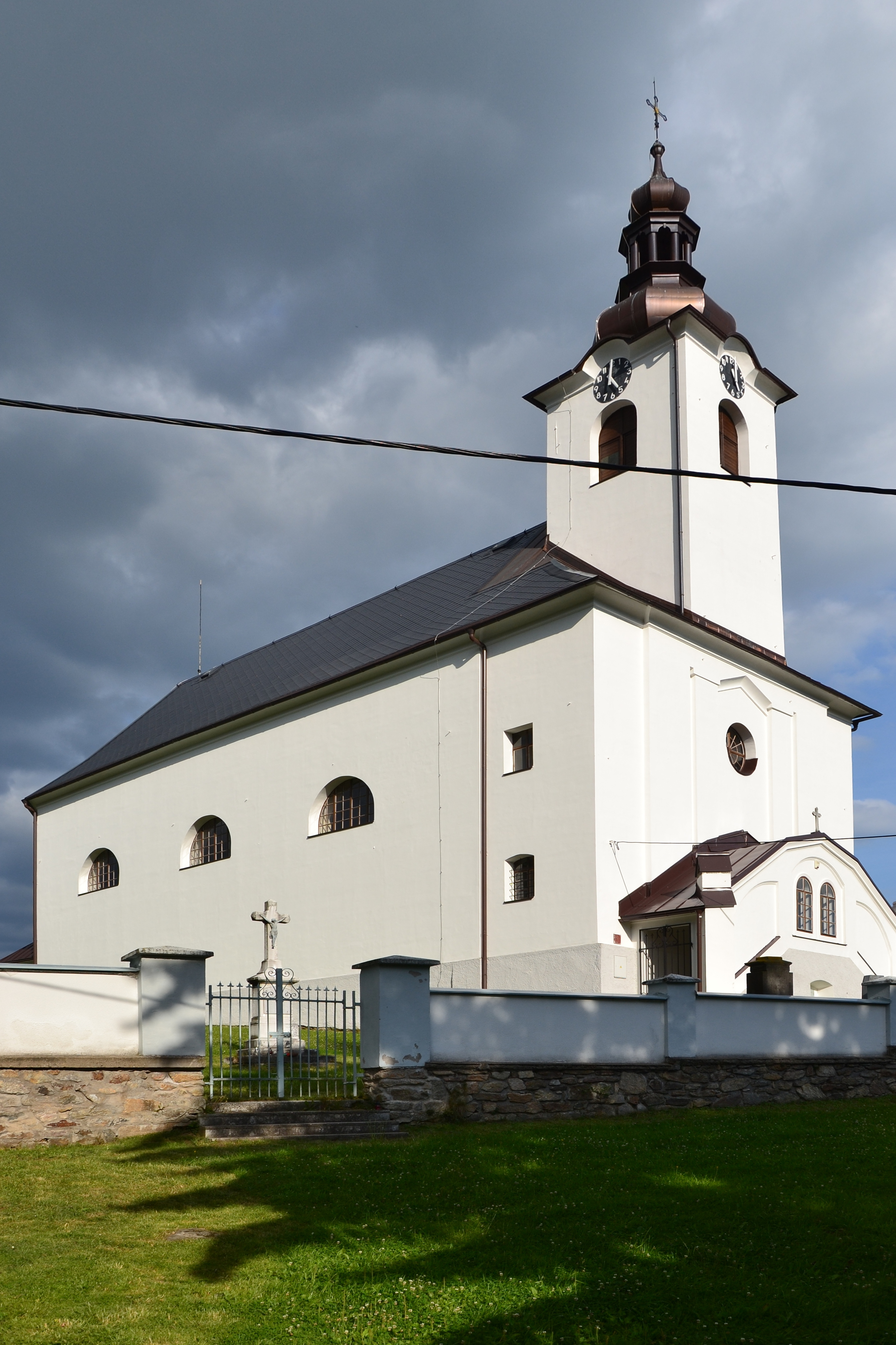 Kostel svatého Aloise, Velká Morava (Dolní Morava).